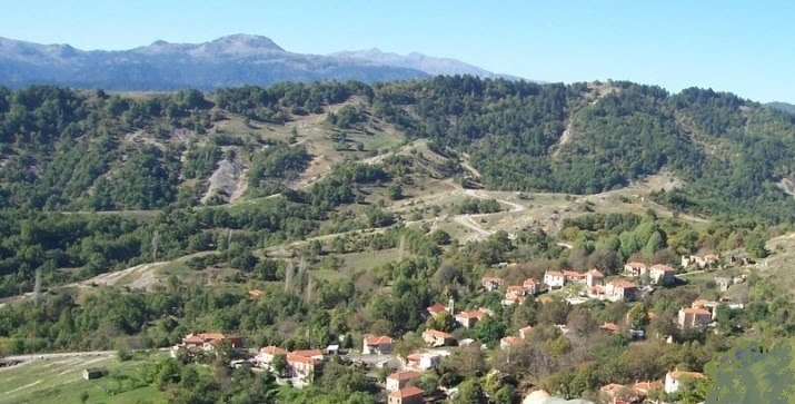 Θέα του Δασυλλίου από τη θέση "Σταυρός". Στο βάθος διακρίνεται ο Σμόλικας.